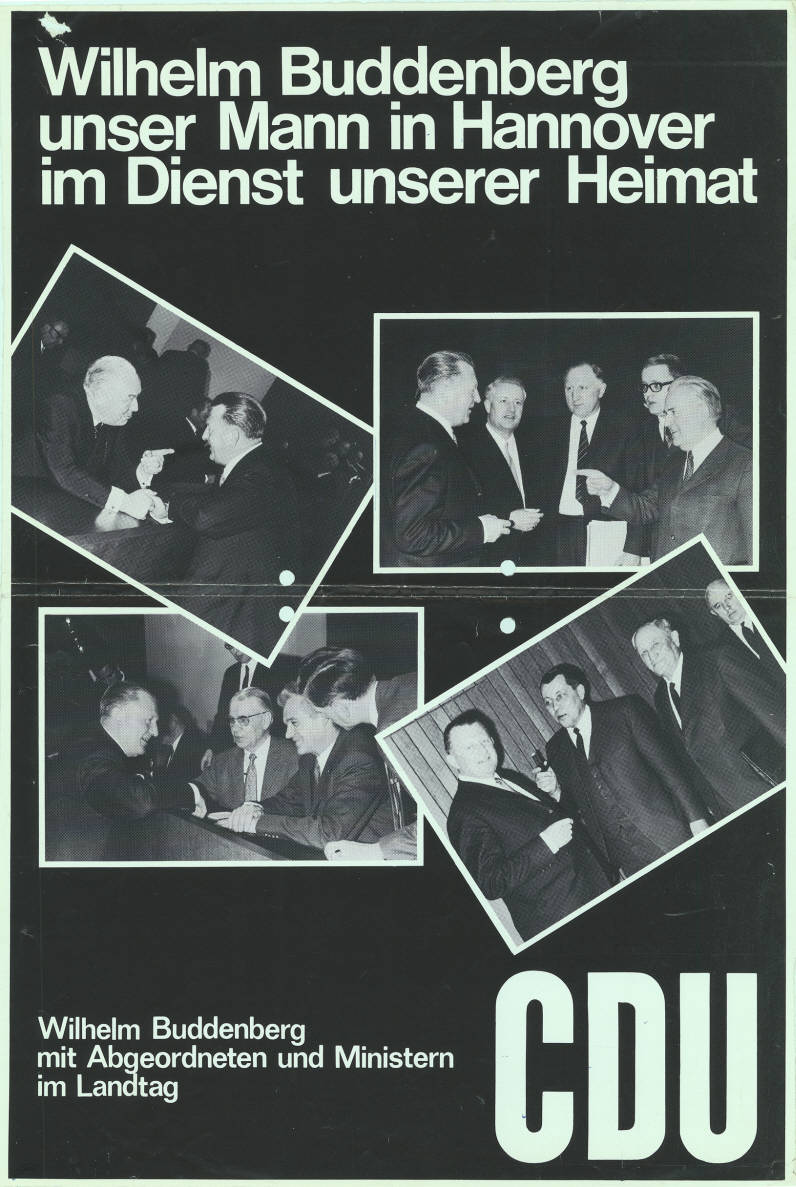 Wilhelm Buddenberg unser Mann in Hannover im Dienste unserer Heimat Wilhelm Buddenberg mit Abgeordneten und Ministern im Landtag CDU Abbildung: Fotocollage Plakatart: Kandidaten-/Personenplakat mit Porträt Objekt-Signatur: 10-008 : 269 Bestand: Landtagswahlplakate Niedersachsen (10-008) GliederungBestand10-18: Landtagswahlplakate Niedersachsen (10-008) » CDU Lizenz: KAS/ACDP 10-008 : 269 CC-BY-SA 3.0 DE